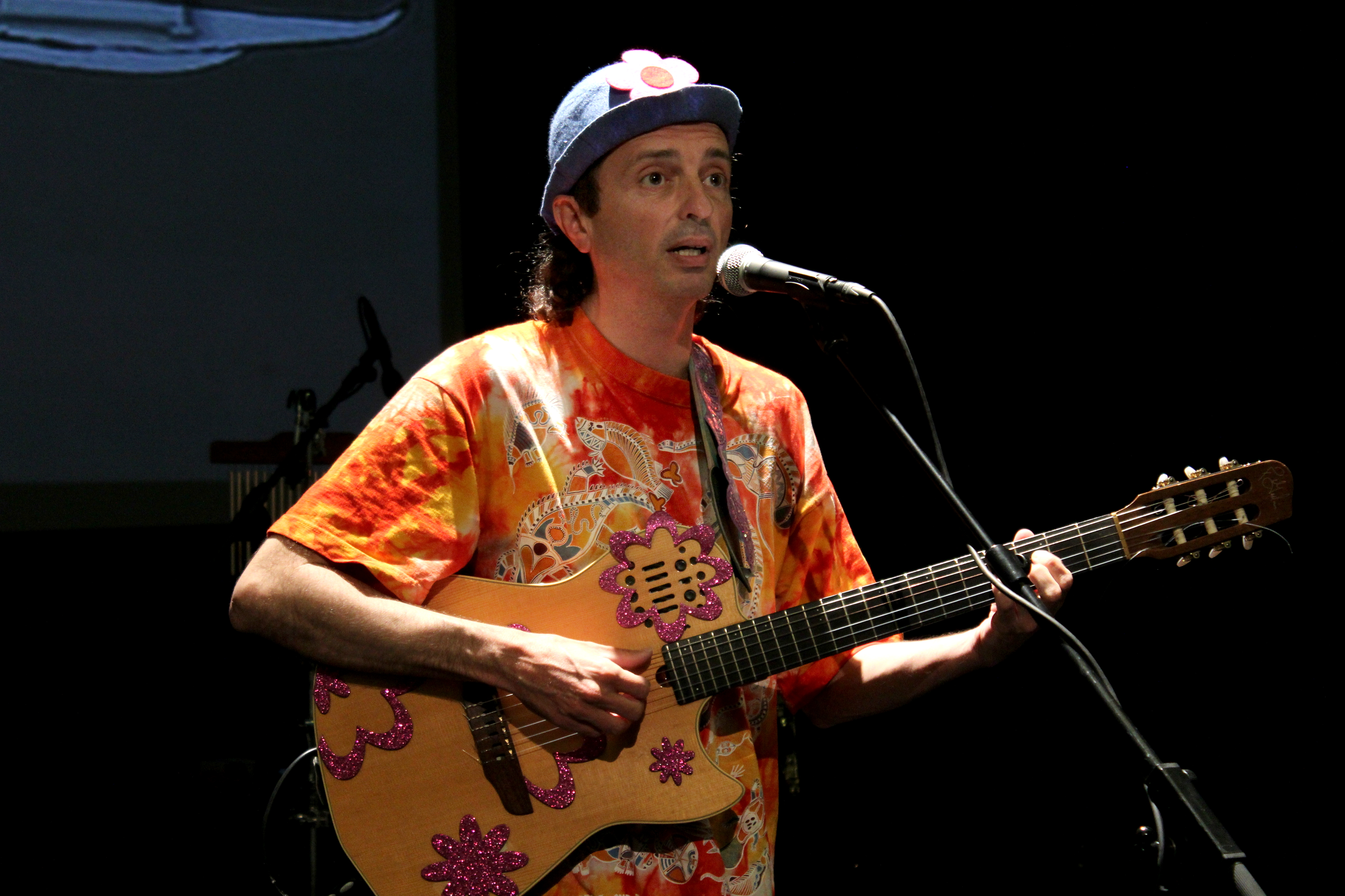 El cantautor Arístides Moreno en concierto. Paraninfo de la Universidad de La Laguna, 20 de abril de 2013